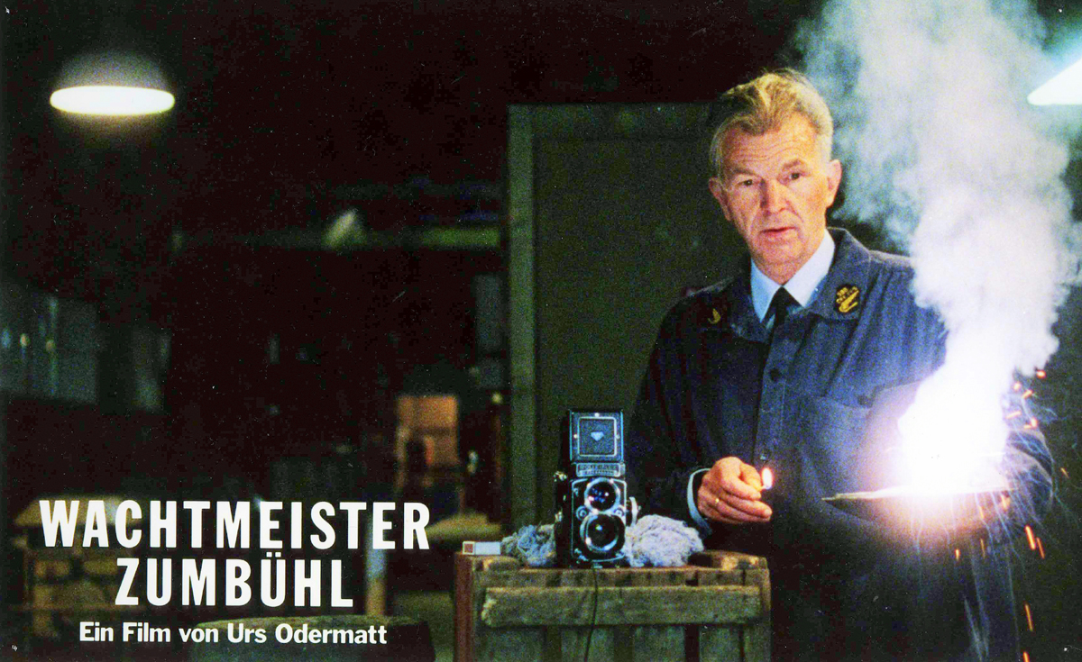 Aushangphoto Spielfilm „Wachtmeister Zumbühl“ von Urs Odermatt, mit Michael Gwisdek